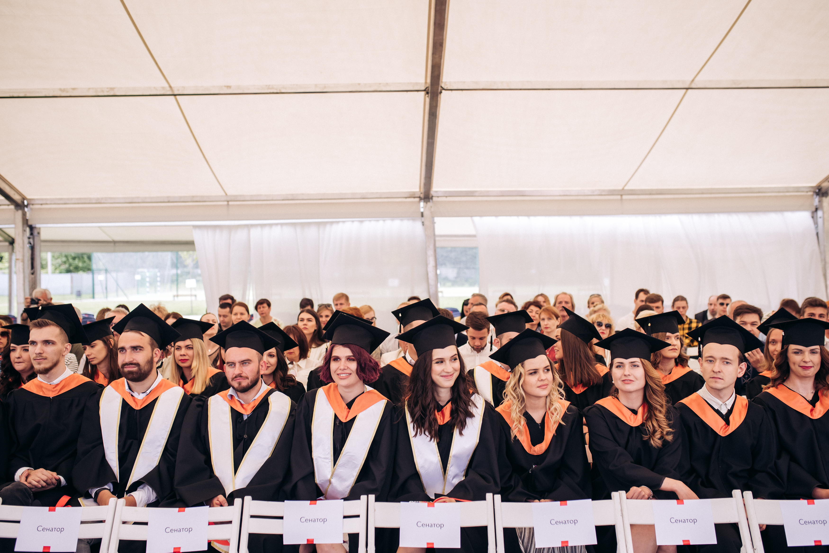 Випускники Львівської бізнес-школи УКУ